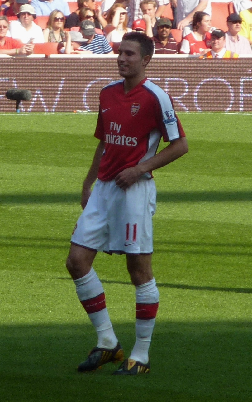 Robin van Persie